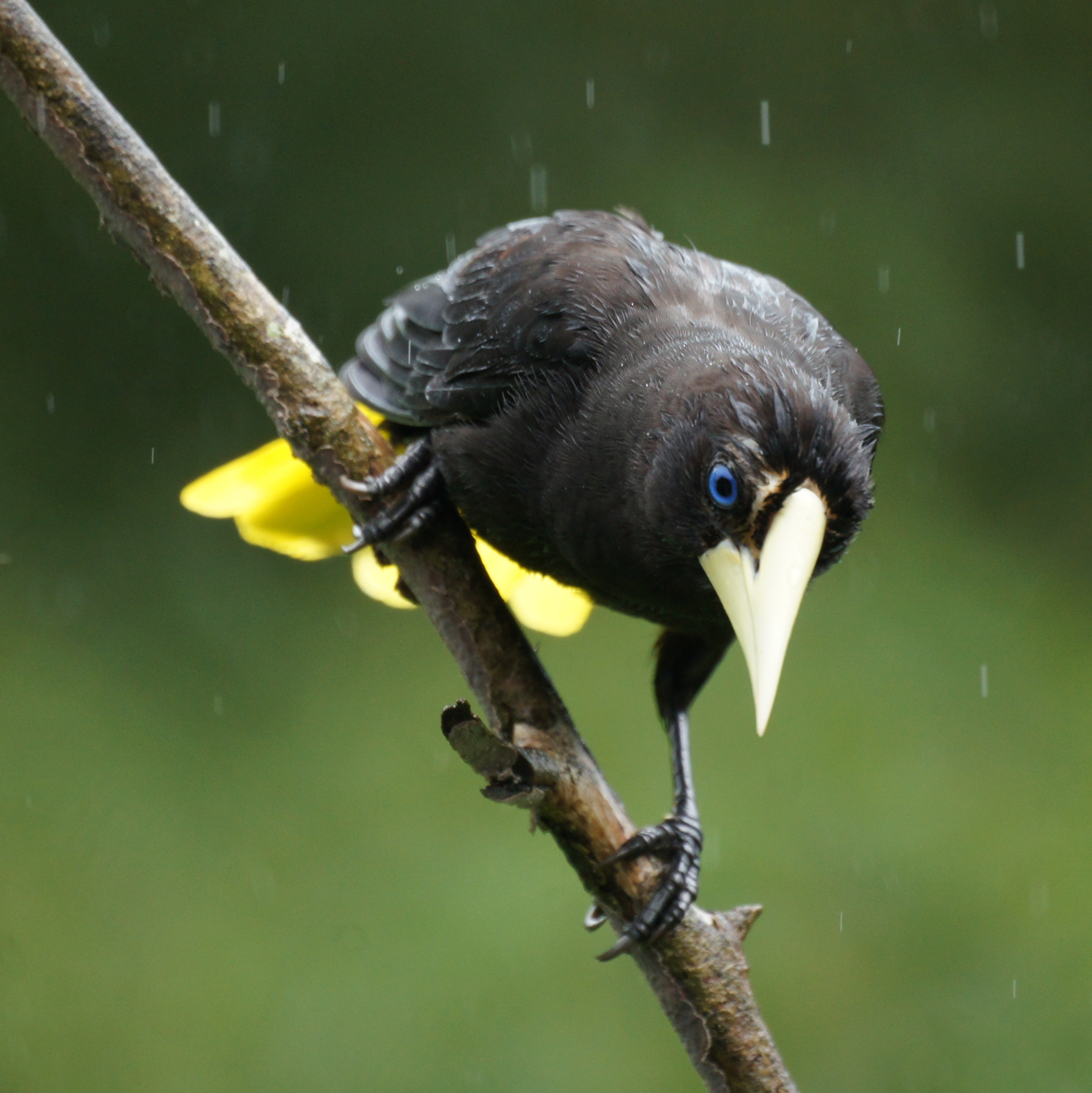 Oropendola